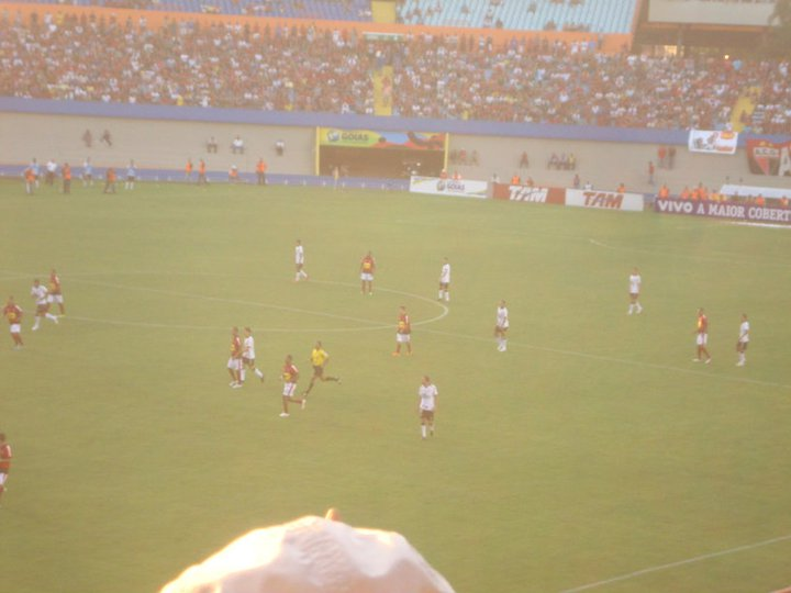 Partido disputado entre el Atlético Goianense y el Corinthians.